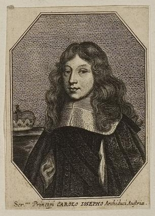 Grafik aus dem Klebeband Nr. 1 der Fürstlich Waldeckschen Hofbibliothek Arolsen Motiv: Erzherzog Karl Joseph